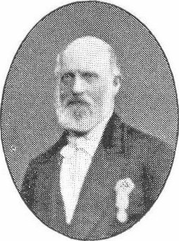 Den svenske tonsättaren Carl Israel Sandström (1824-1880).